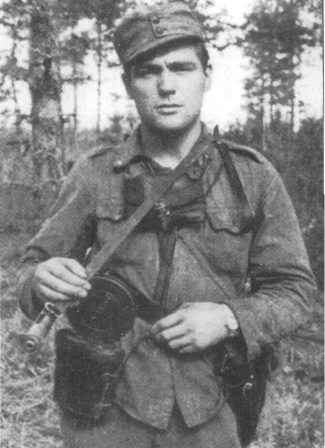 Harry Järv på väg till ett spaningsuppdrag tillsammans med Allan Finholm den 5 september 1942.